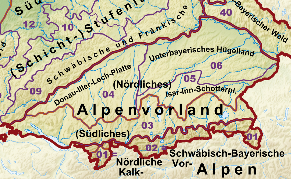 Haupteinheitengruppen von Alpenvorland und Alpen